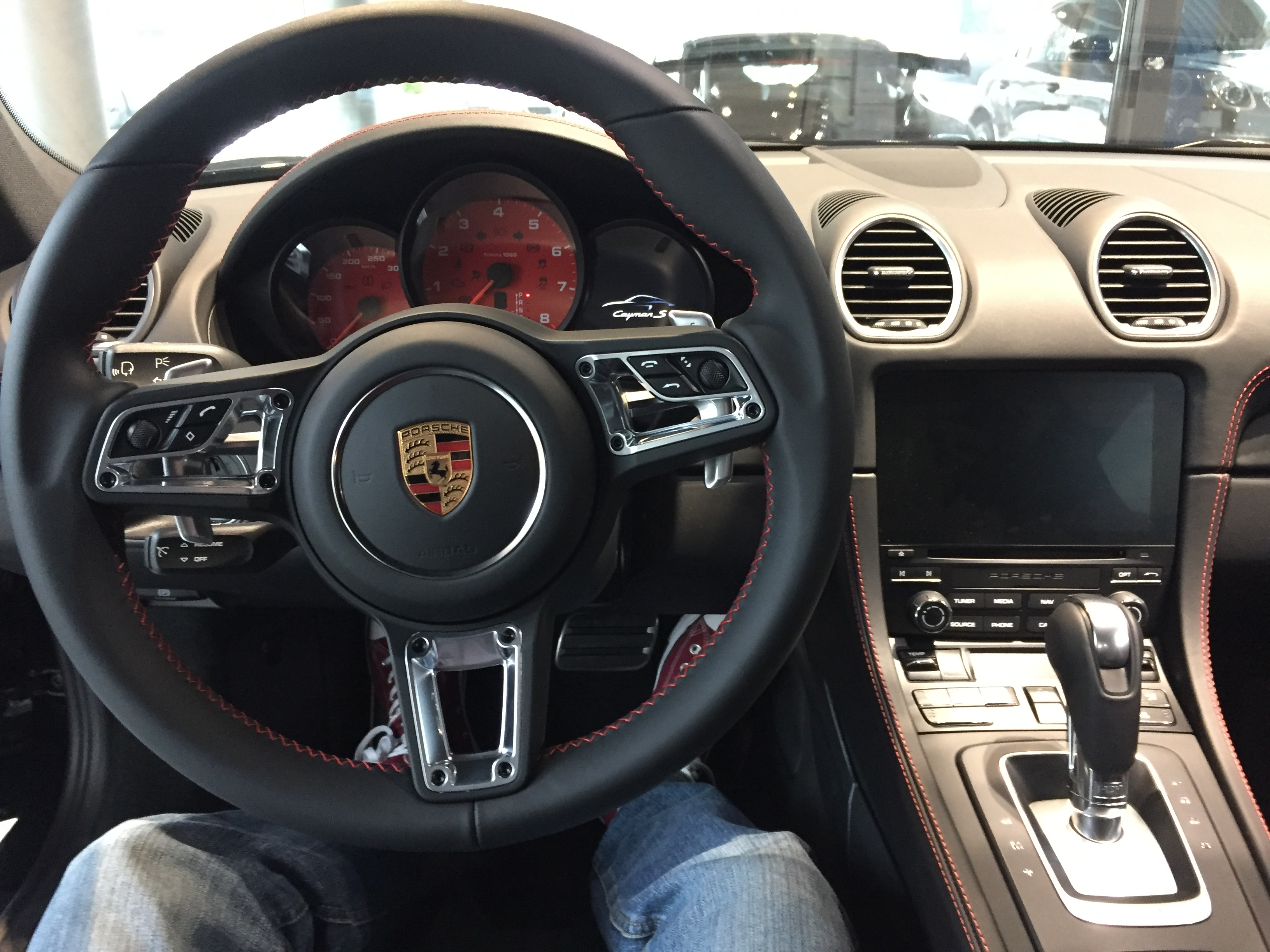 Porsche 718 Cayman S - Cockpit